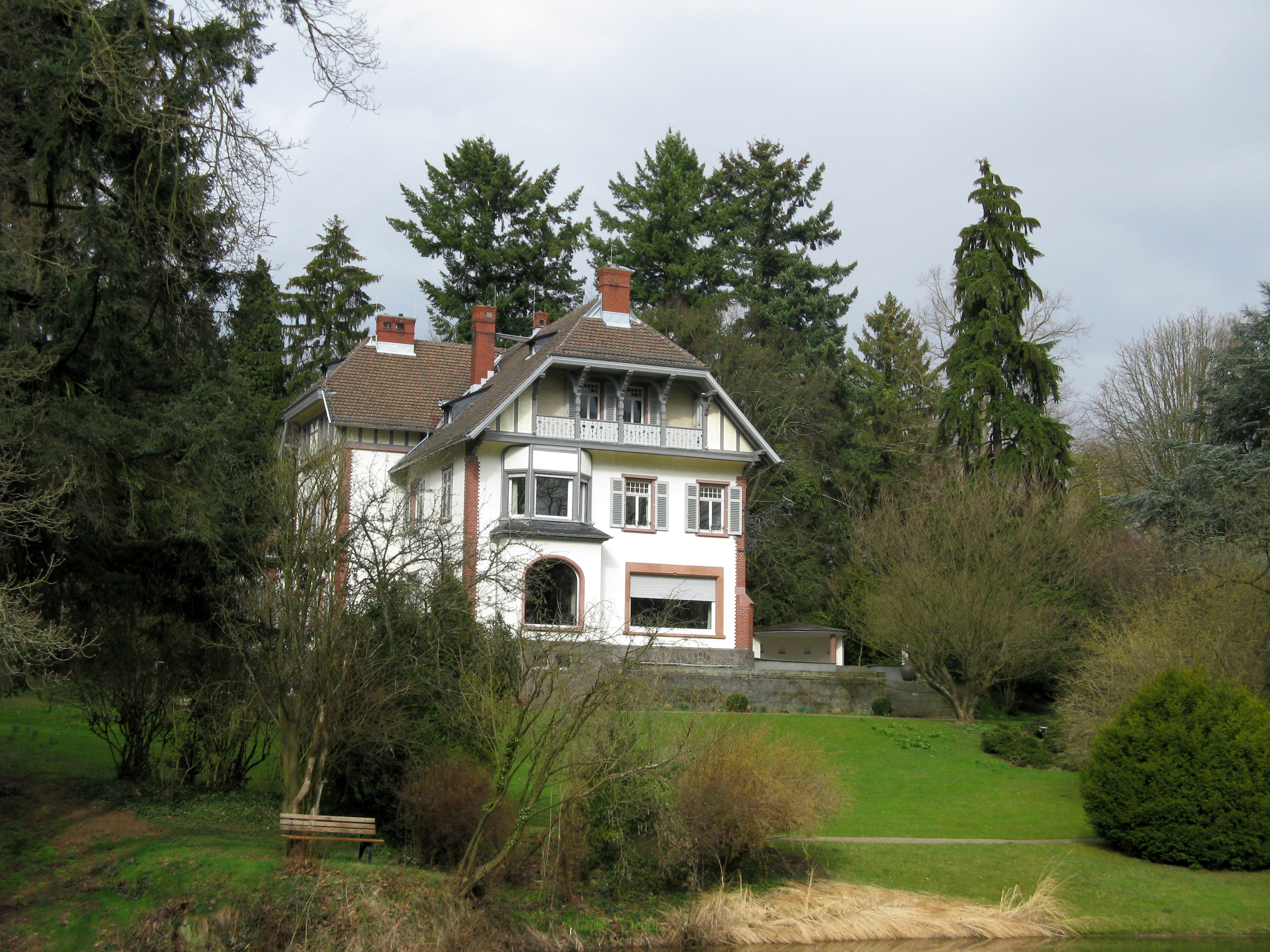 Villa Gail im Gailschen Park Rodheim-Biebertal